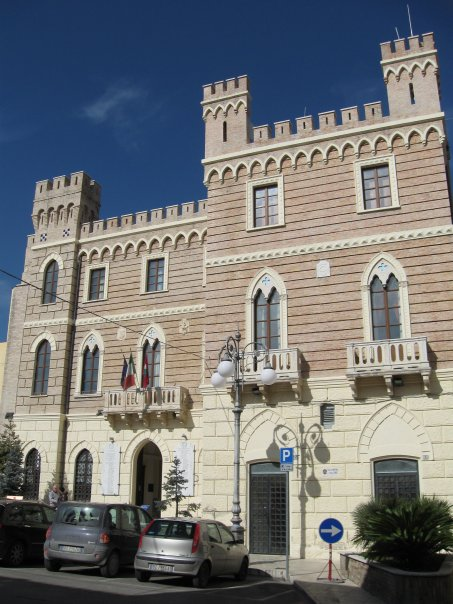 Palazzo Municipale di Nereto (Teramo)